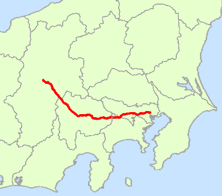 国道20号線の経路概略図